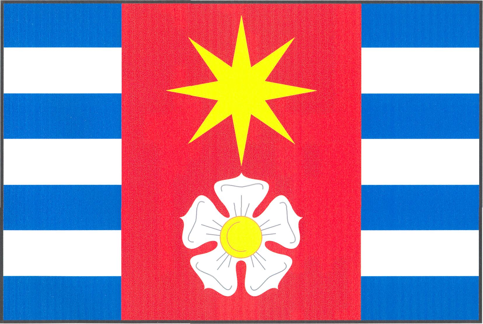 Vlajka obce Losiná